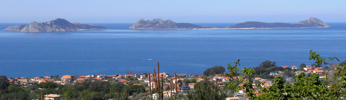 As Ilhas Cies vistas desde Vigo.